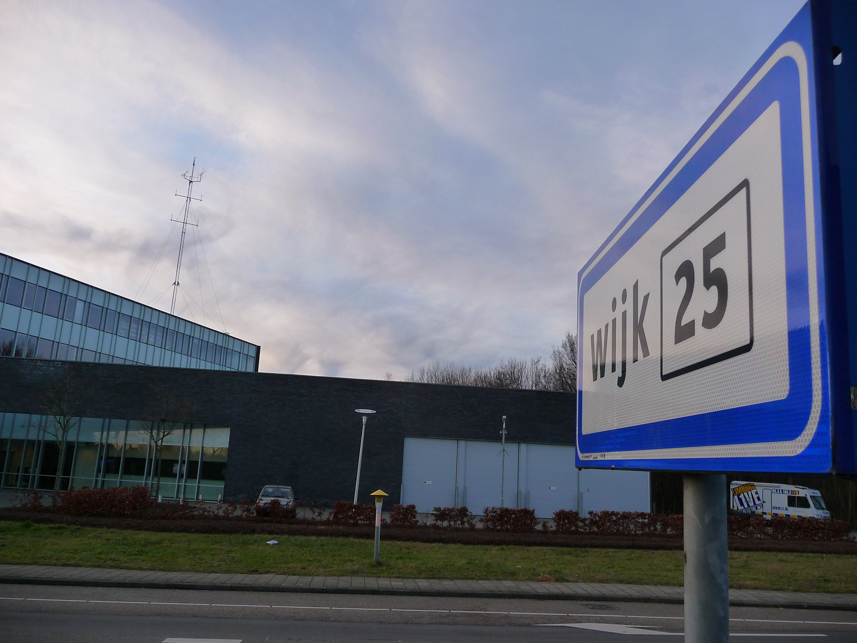 Studio of L1 in the Amby neighbourhood (wijk 25) in the city of Maastricht